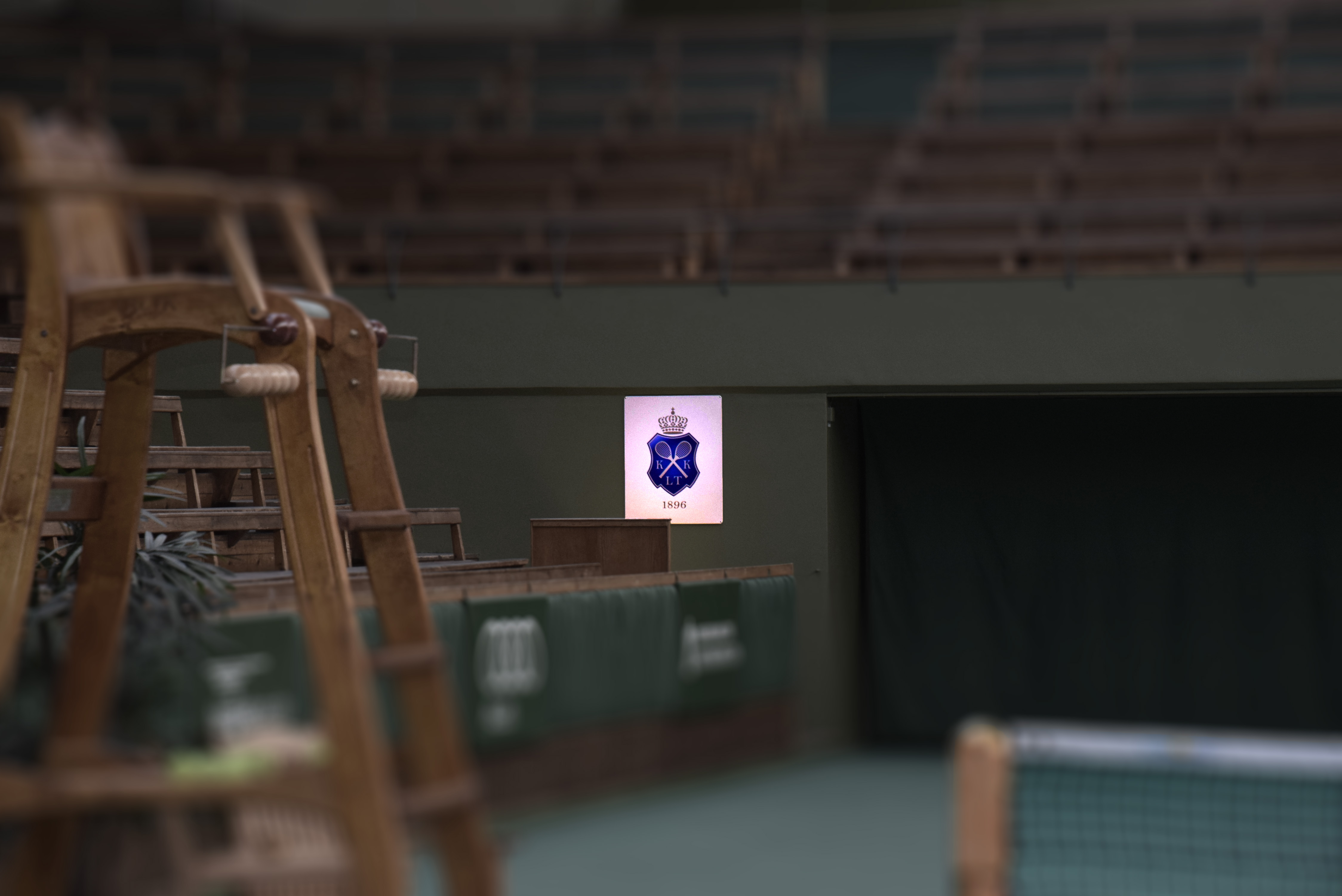 Center Courten